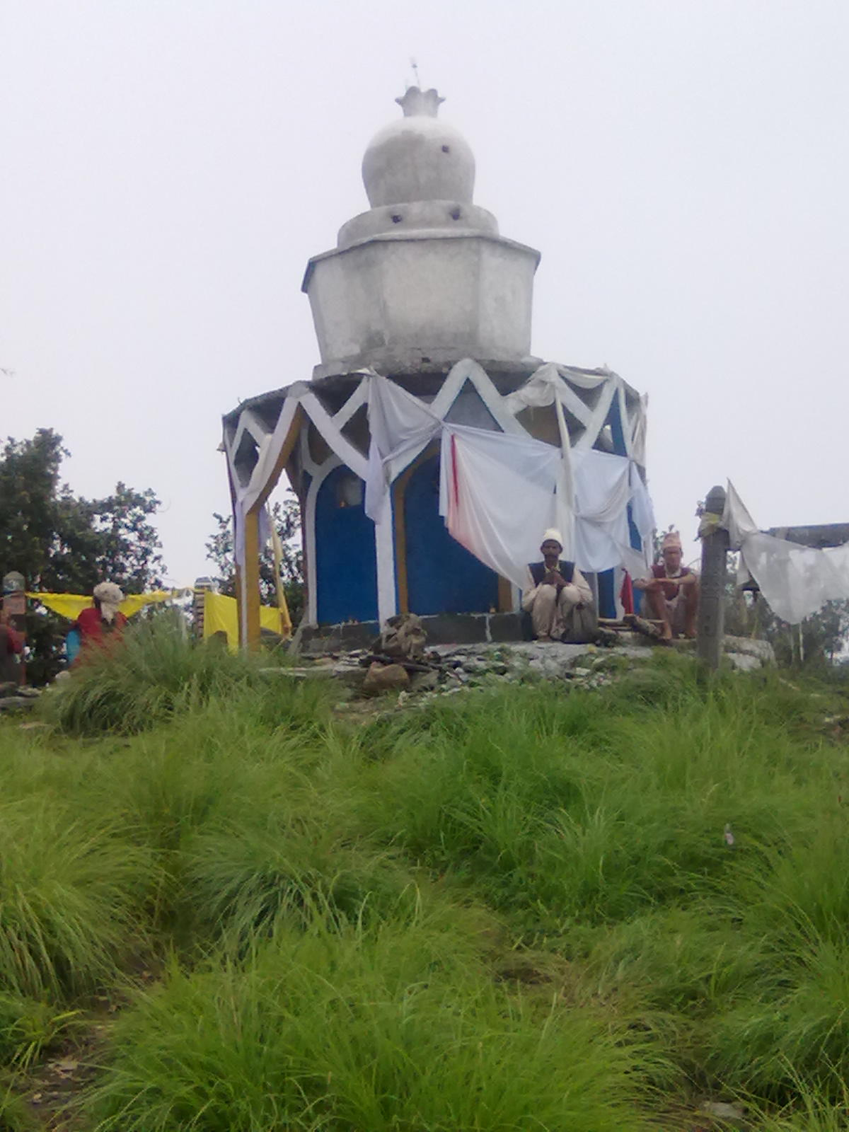 नेपाली: शिगासकाे मन्दिर